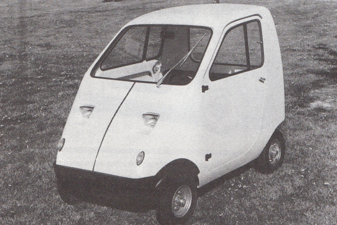 CICOSTAR